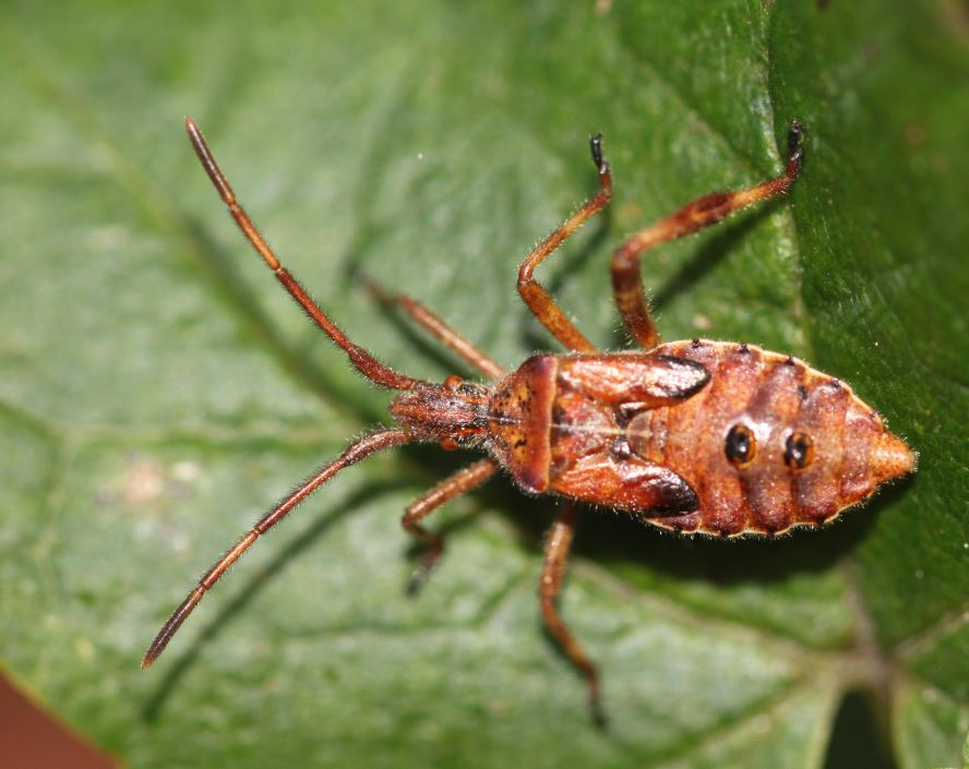 Nymphe der Amerikanischen Kiefernwanze (Leptoglossus occidentalis) am 13.10.2016 in der Schwetzinger Hardt